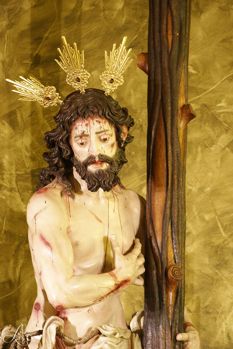 Fotografia realizada por Manuel Francisco Álvarez Ruiz.